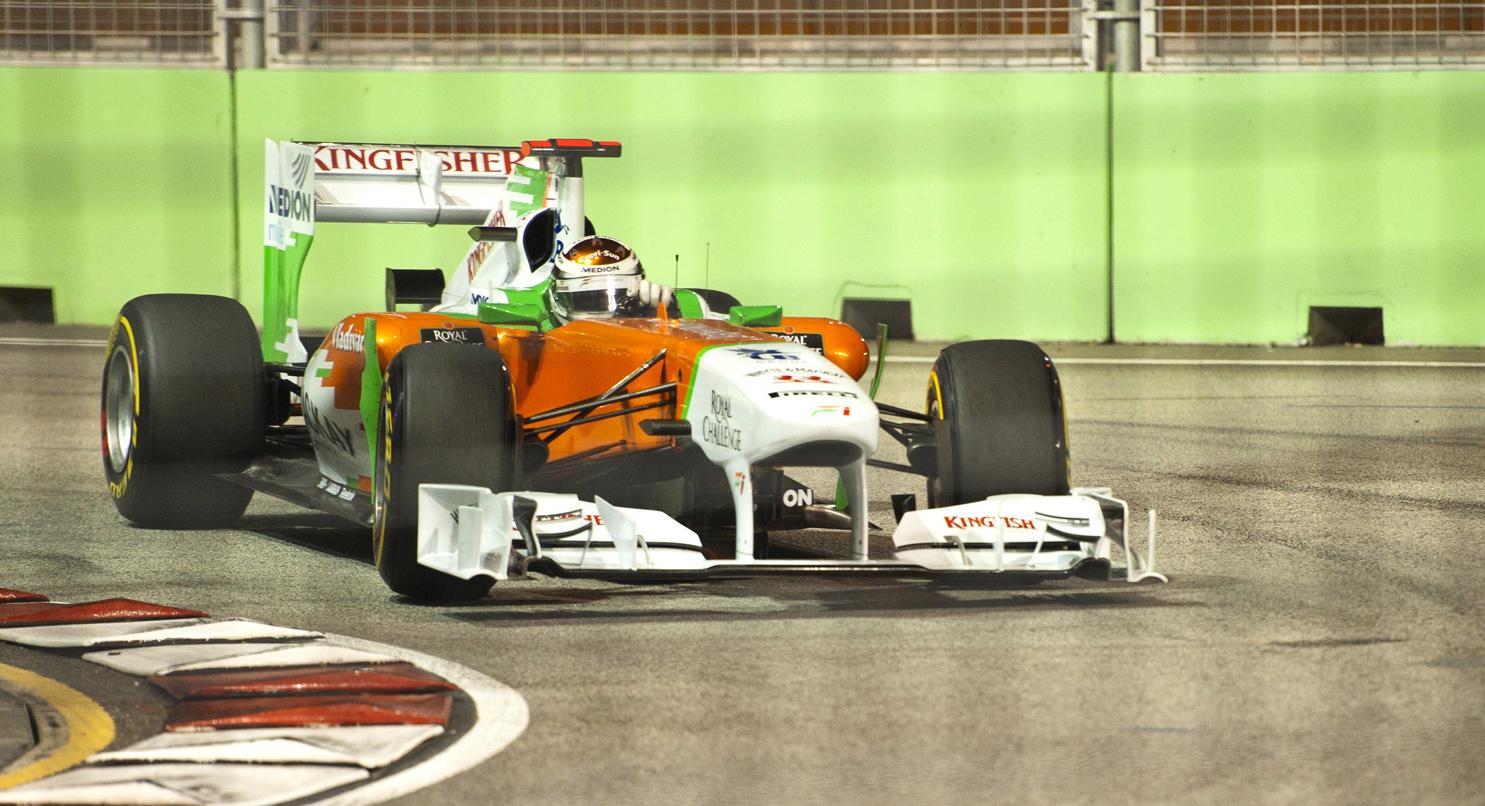 Photography By : Dhonsky